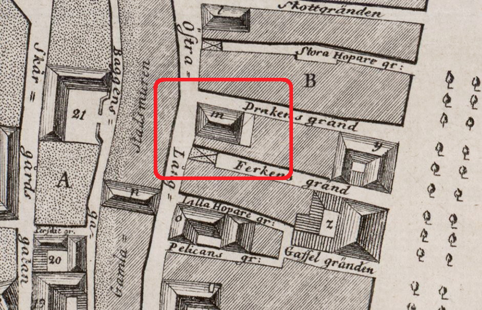 Del av Jonas Brolins Stockholmskarta visande kvarteret Apollo och källaren Sveriges Vapen (litt m: Sveriges Wapn)